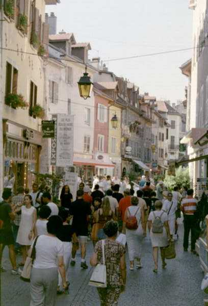 Annecy - rue Carnot - août 1999 Cette photographie de la rue Carnot a été prise par Utilisateur:Semnoz à Annecy en Haute-Savoie (France) en août 1999, et placée dans le domaine public. "Rue Carnot"" at Annecy, Haute-Savoie, France. Taken by wiki-french-user Semnoz in August 1999 and placed in the public domain.